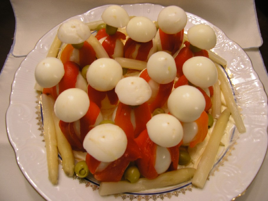 Variedad de tapa, entrante o aperitivo